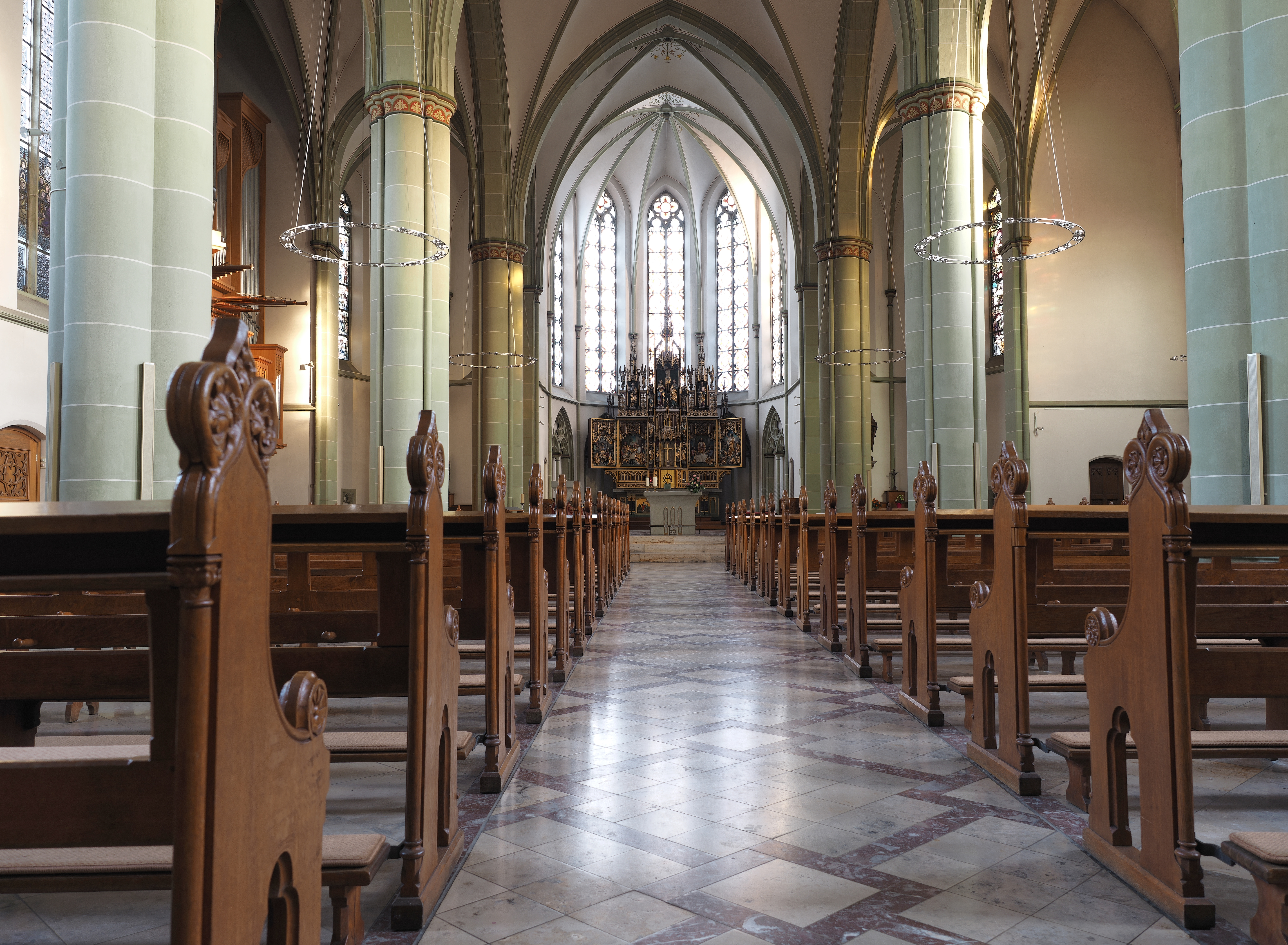 Der Innenraum der Kirche Sankt Peter und Paul im Stadtbezirk Sodingen in Herne.